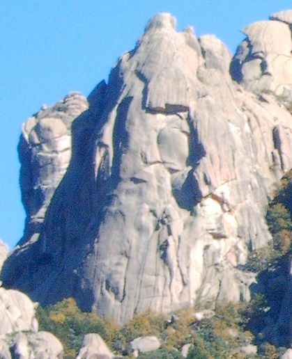 Pared sur del Risco del Pajaro en La Pedriza de Manzanares en la Sierra de Guadarrama del Sistema central de España